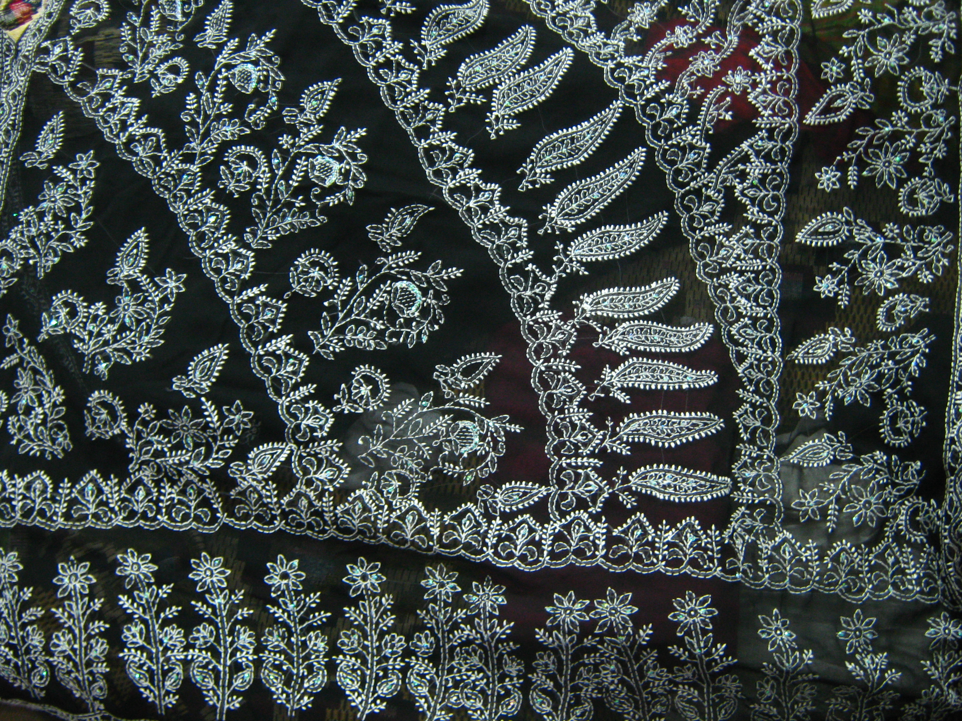 साड़ी के पल्लू पर चिकन की कढाई